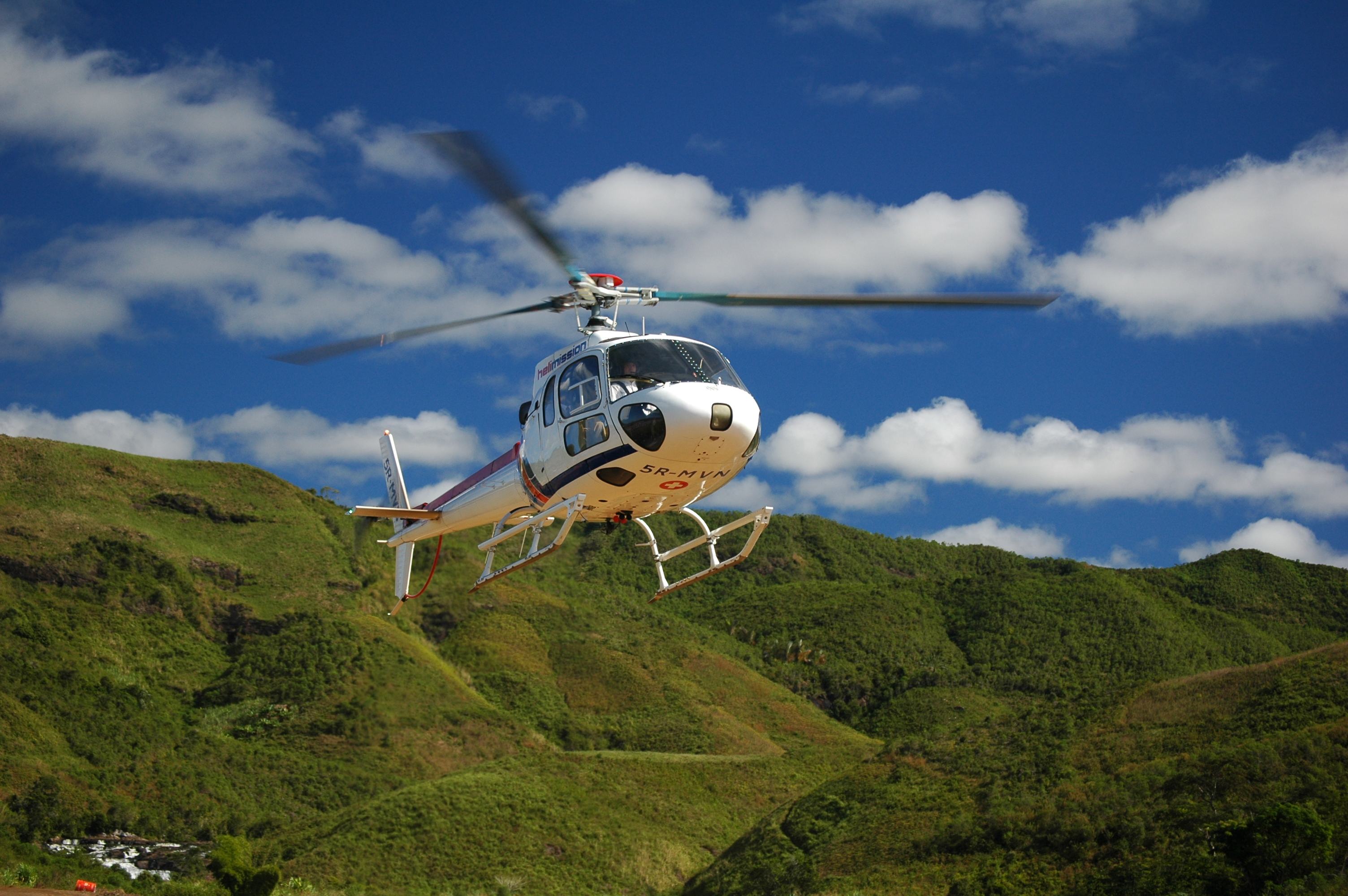 Airbus A350 Helikopter der Helimission